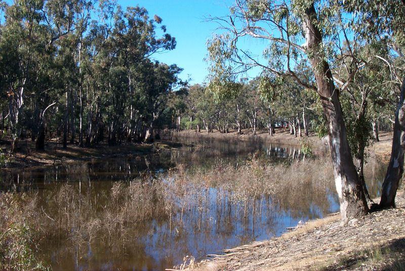 Le Murrau au milieu de gommiers rouges